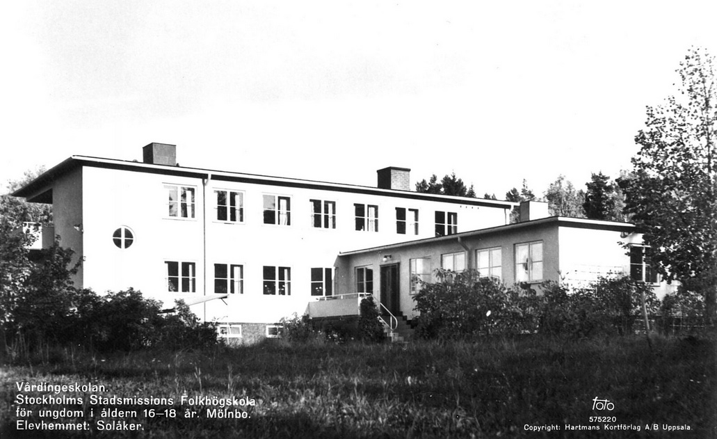 Vårdingeskolan, Solåkers elevhem. Byggt för Stadsmissionen som Solåkers upptagnings- och isoleringshem 1941. Arkitekt: Natanael Karlsson